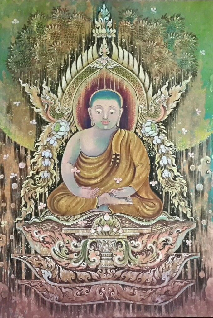 วงวยง